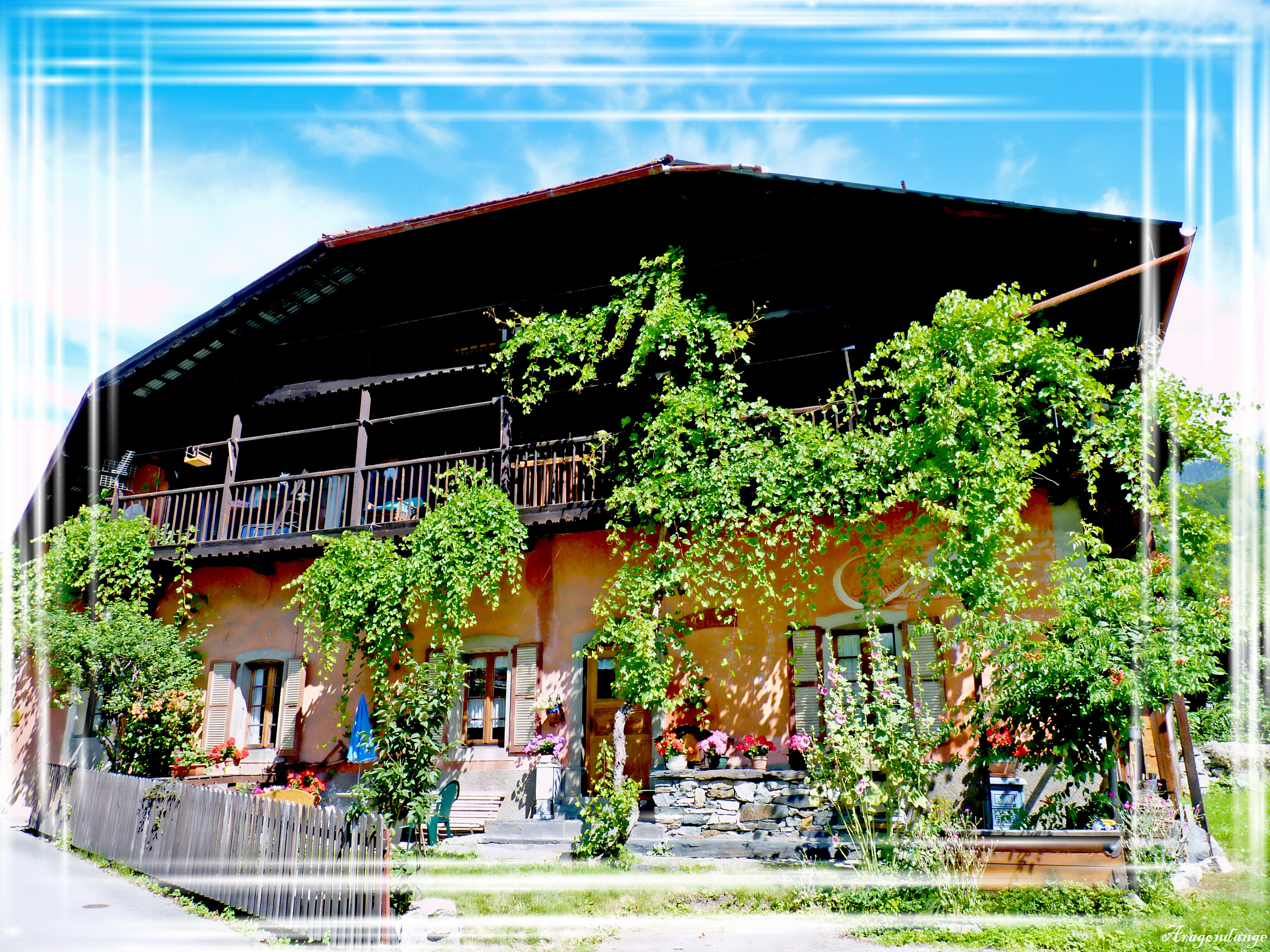 Ancienne ferme traditionnelle dans le hameau du Vieux Servoz typique de l’habitat haut savoyard